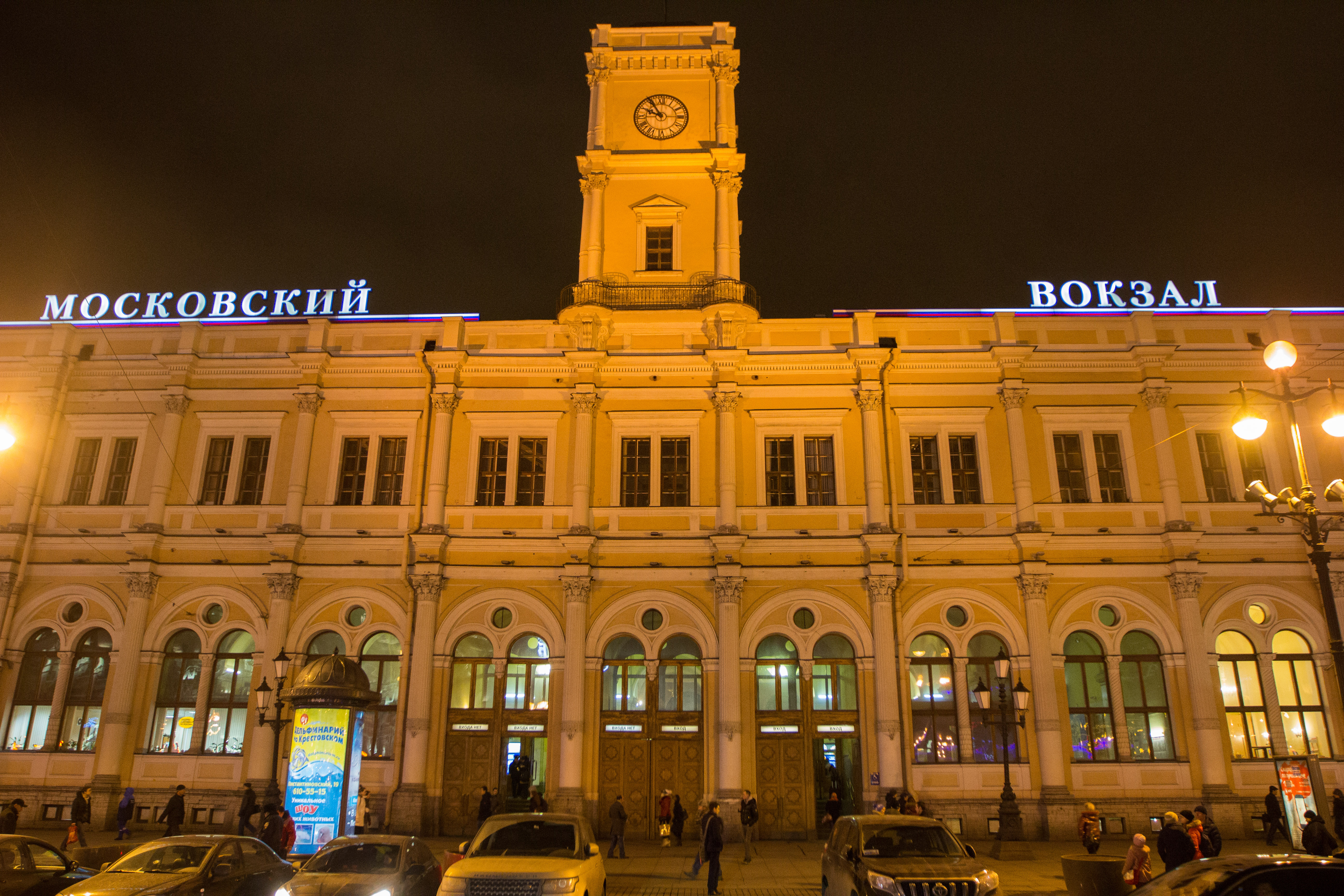 Vue de la façade de la gare de Moscou à Saint-Pétersbourg (Russie)